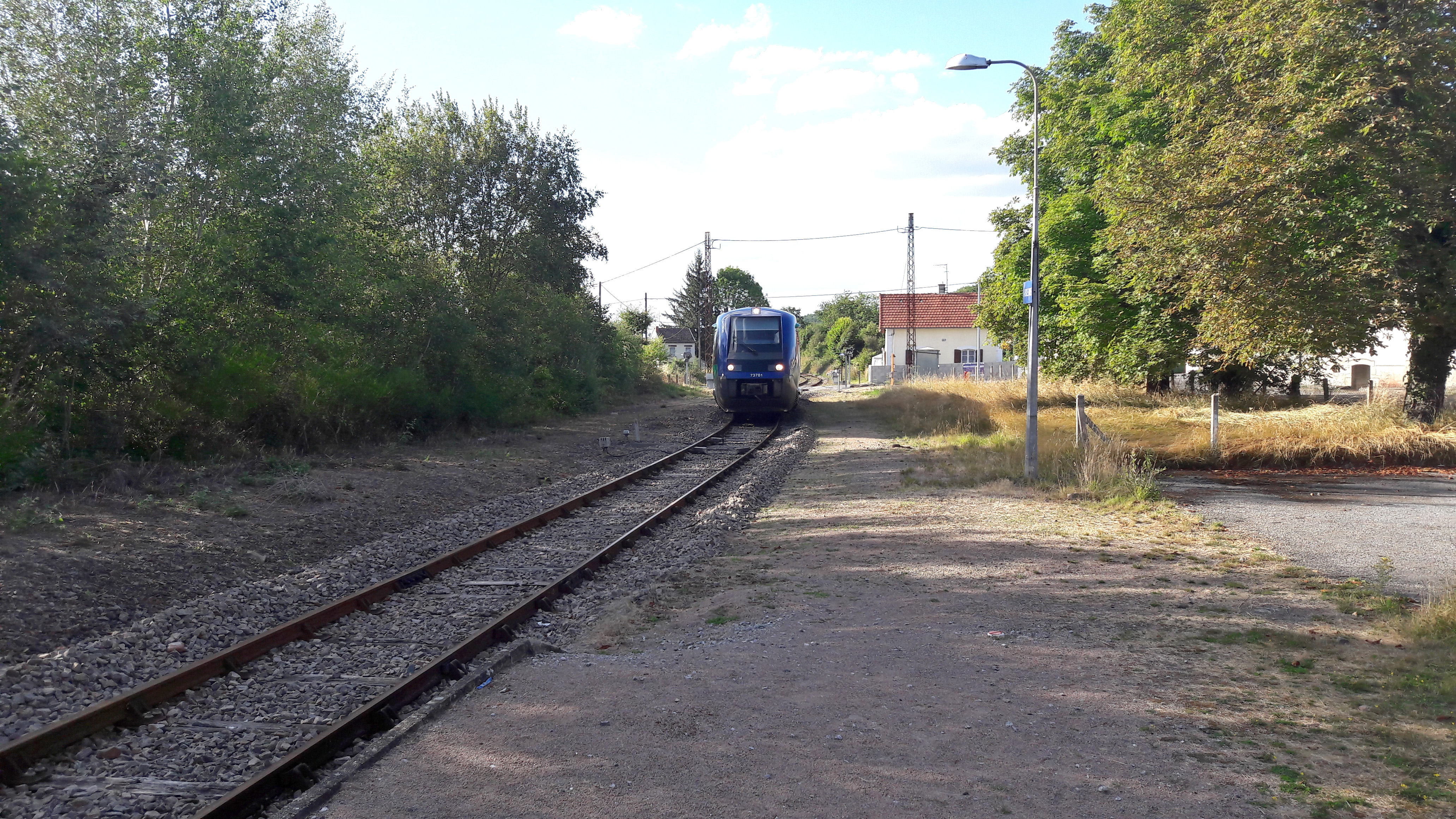 Approche de la gare de Lavaveix les mines, passage au PN 256, TER N°868 712 en provenance de Limoges Bénédictins et à destination de Felletin